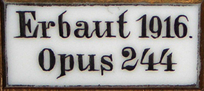 Opus-Schild am Spieltisch der Strebel-Orgel in der St. Marienkirche (Stadtkirche) in Gräfenthal